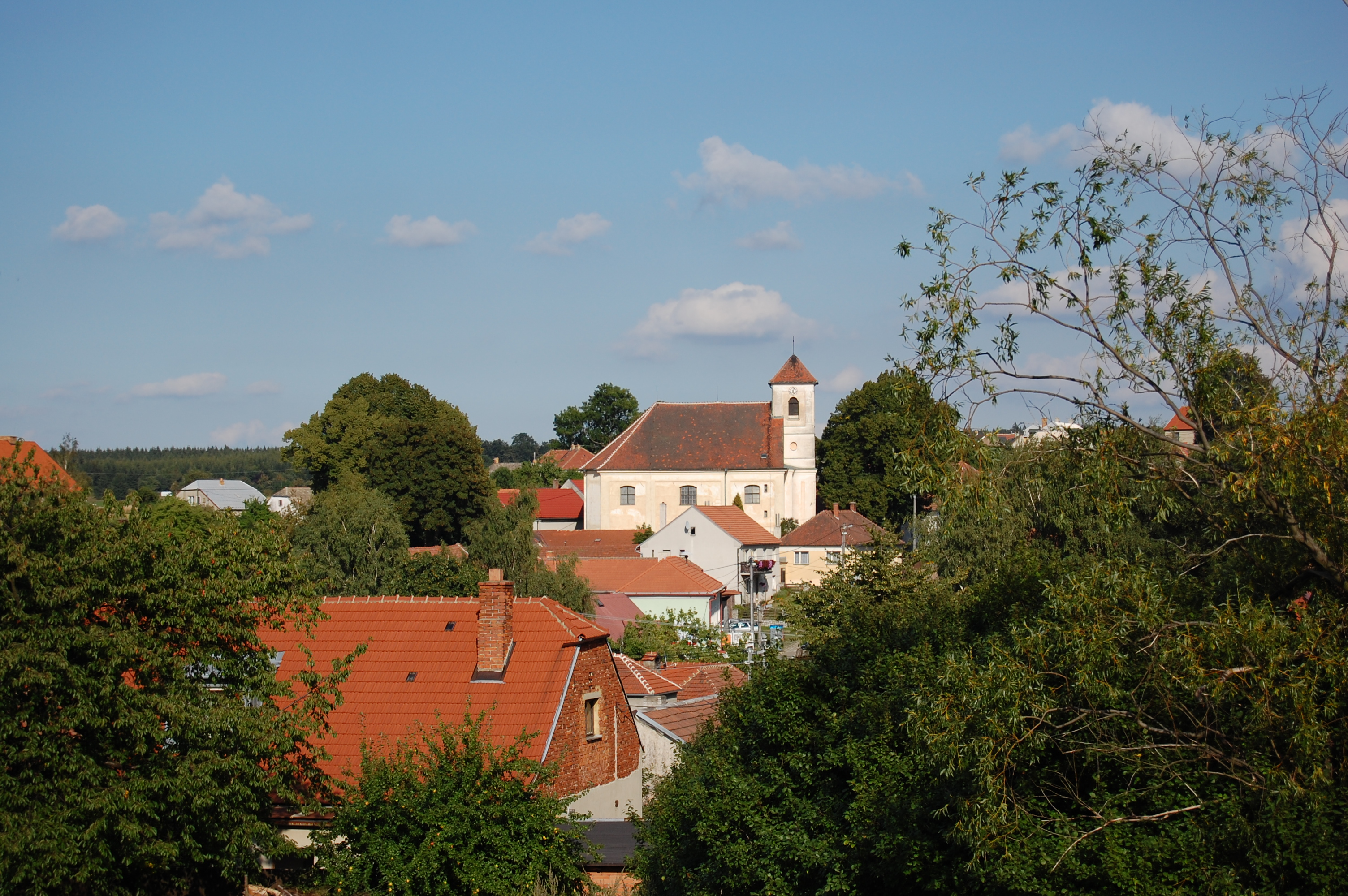 Kostel svatého Bartoloměje - pohled z dálky, Žďárná, okres Blansko